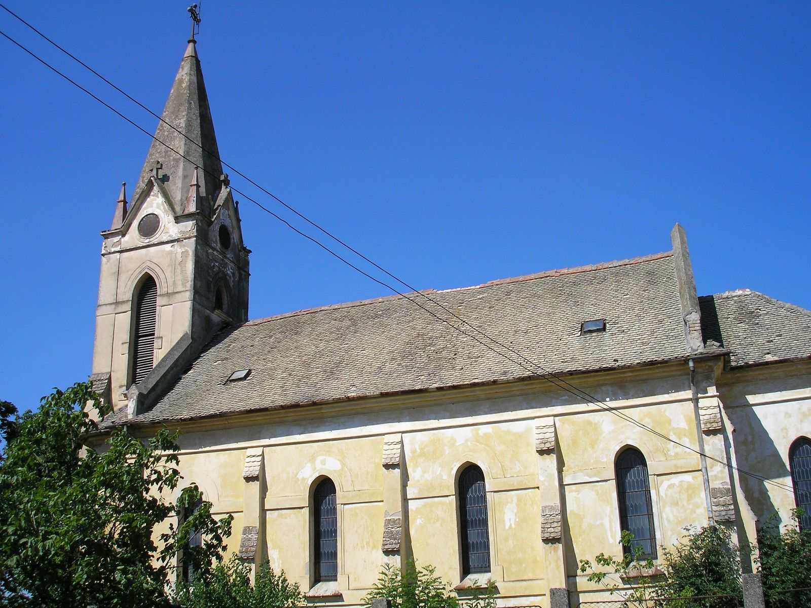 Banat Bulgarian Roman Catholic church in Telepa (Colonia Bulgară), Romania